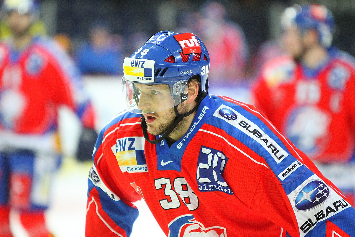 Thomas Ziegler sous le maillot des ZSC Lions